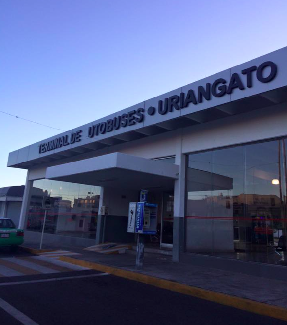 Terminal de Autobuses de Uriangato